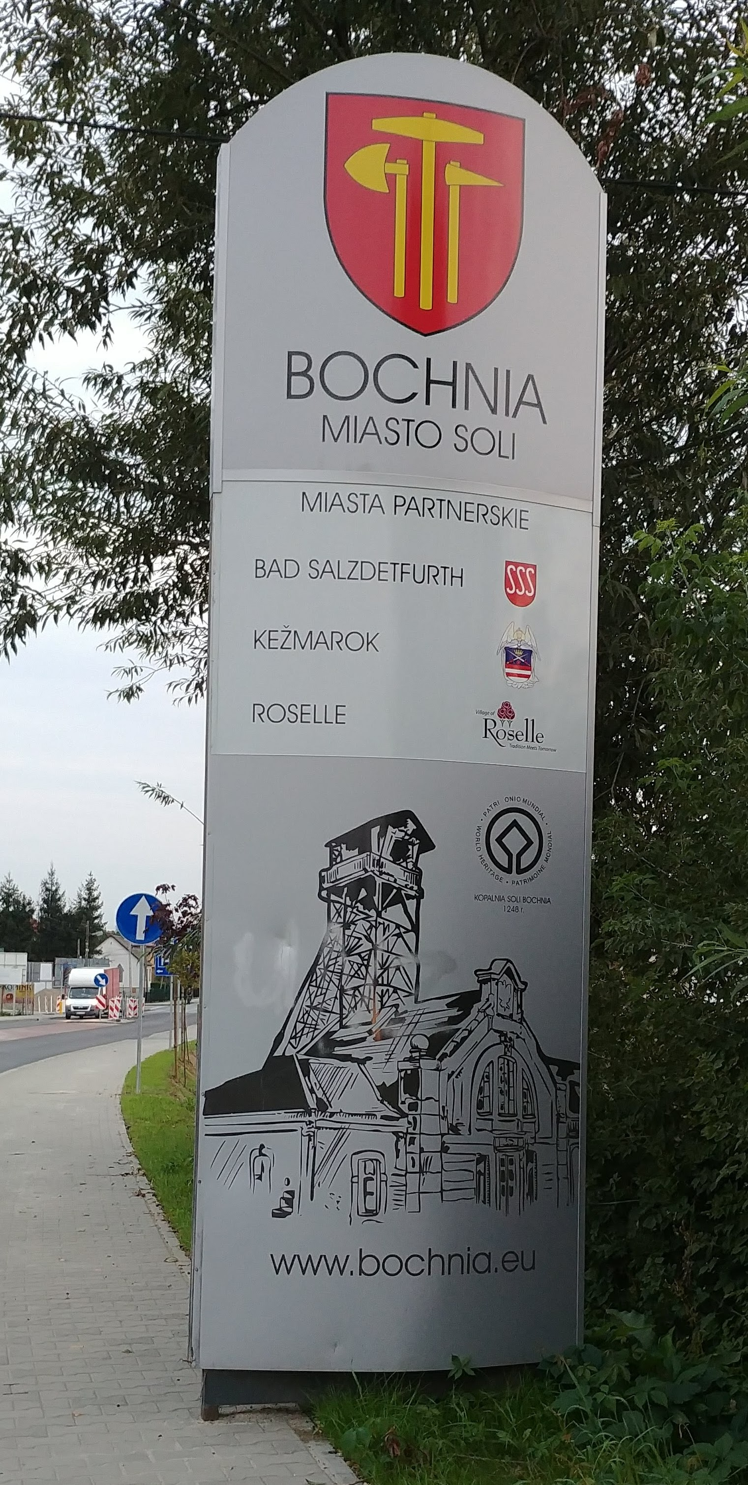 Witacz przy wjeździe do Bochni.